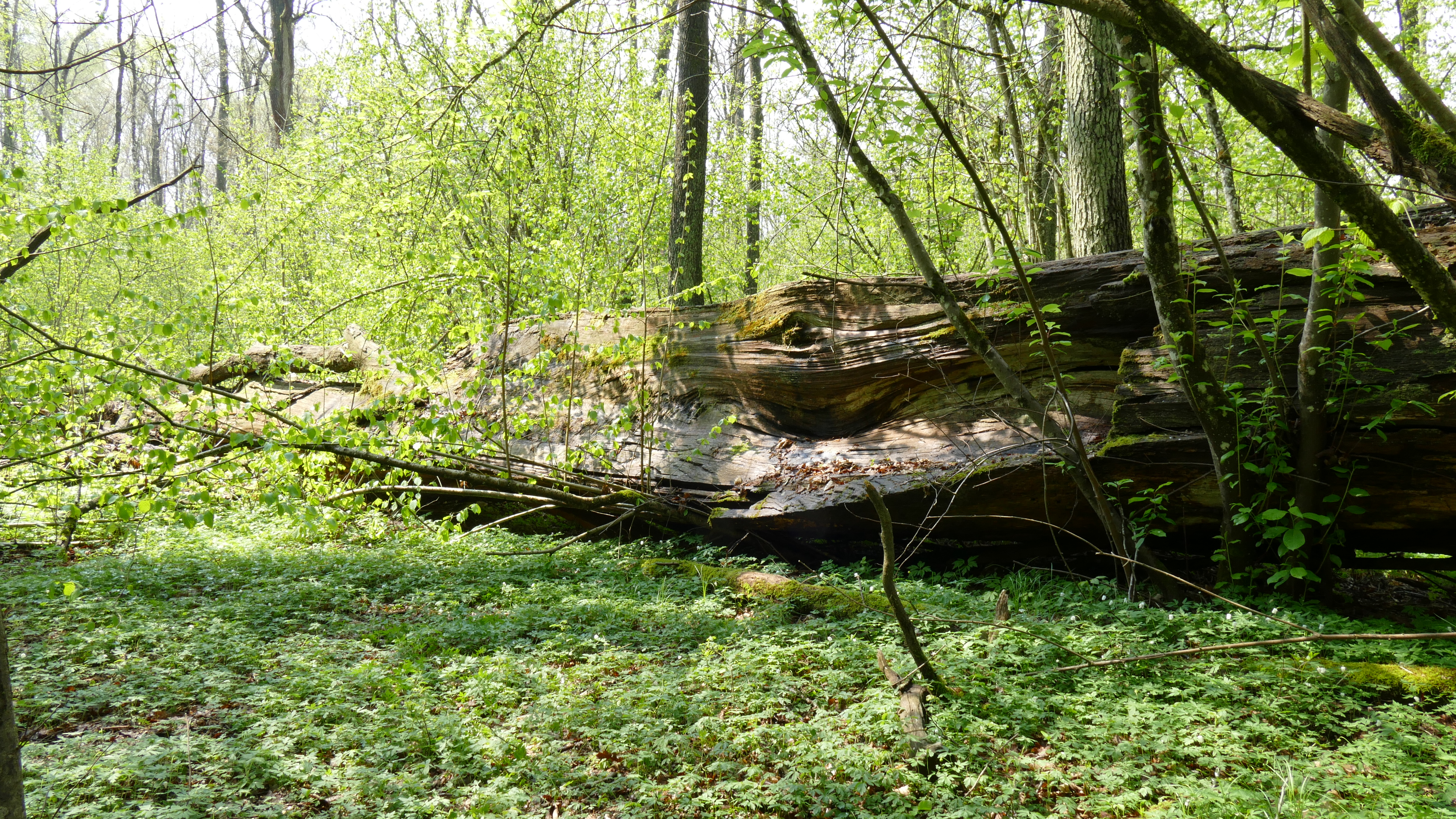 Stamm der etwa 150 Jahre alten und toten "Soraya-Eiche" im Rainer Wald. Der Rainer Wald bei Straubing (Niederbayern) ist seit Mai 2017 Naturwaldreservat und Teil des FFH- und Vogelschutzgebietes 'Wälder im Donautal'